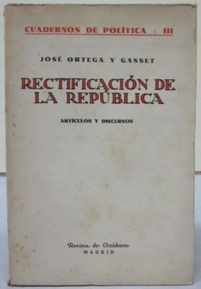 Portada de la edición de Revista de Occidente en 1932 de "Rectificación de la República" de José Ortega y Gasset